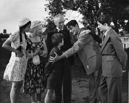 Image du film Le Père Chopin Ginette Letondal, Madeleine Ozeray, Louis Rolland, Marcel Chabrier, Guy Maufette, Pierre Dagenais